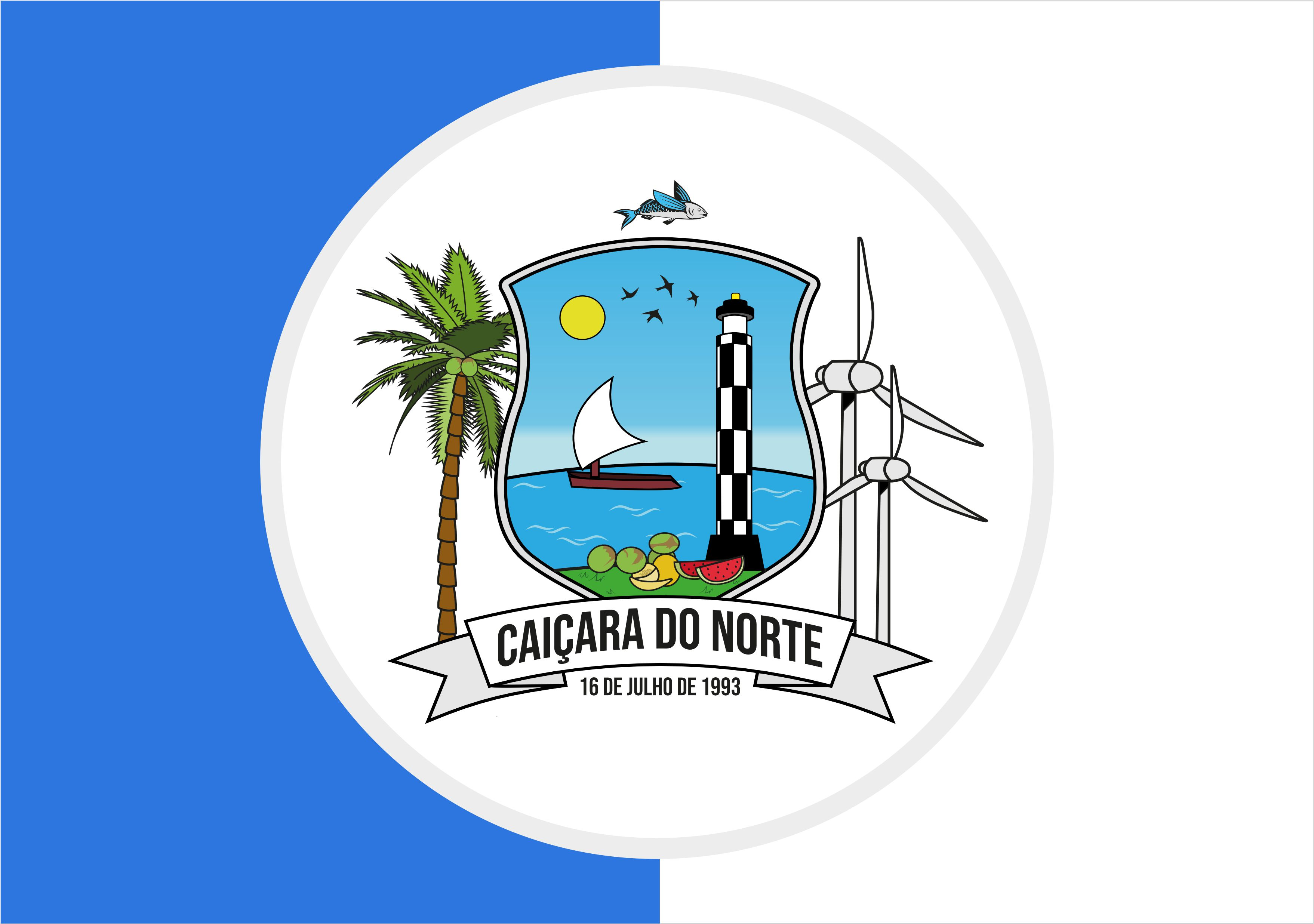 Bandeira do Município de Caiçara do Norte/RN regulamentada pela Lei Municipal nº 138 de 19 de maio de 2011. Caraterísticas da Bandeira: Constituída de um retângulo em três panos verticais: azuis nas extremidades e branco ao meio, simbolizando harmonia e paz, tendo ao centro, o escudo do município